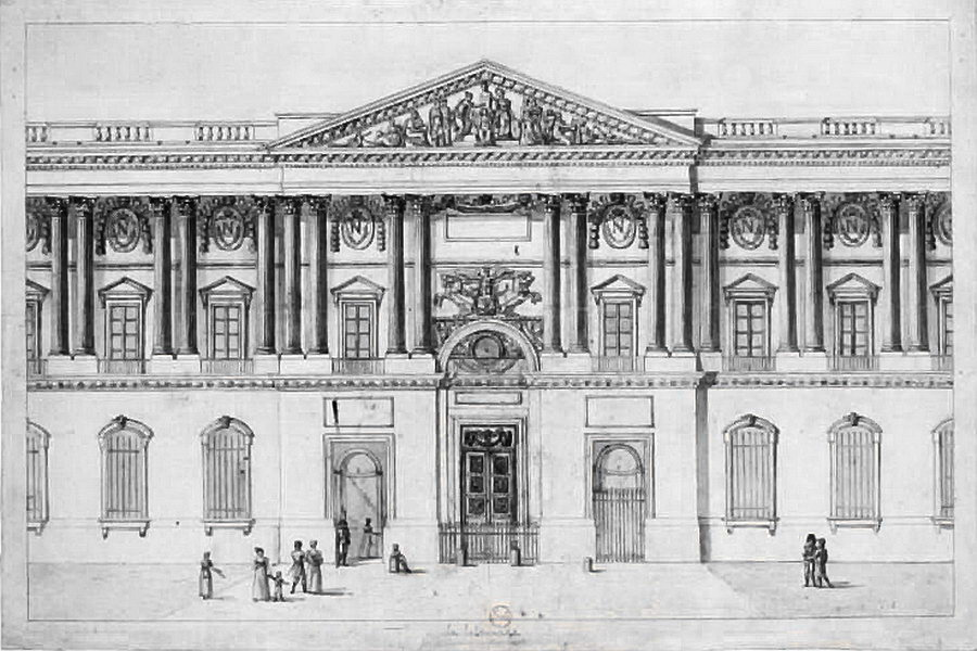 François-Frédéric Lemot : Minerve entourée des muses de la Victoire couronne le buste de Napoléon, 1808-1810, sculpture du fronton de la colonnade du Louvre. N.B. : le buste de Napoléon a été remplacé par celui de Louis XIV sous la Restauration.